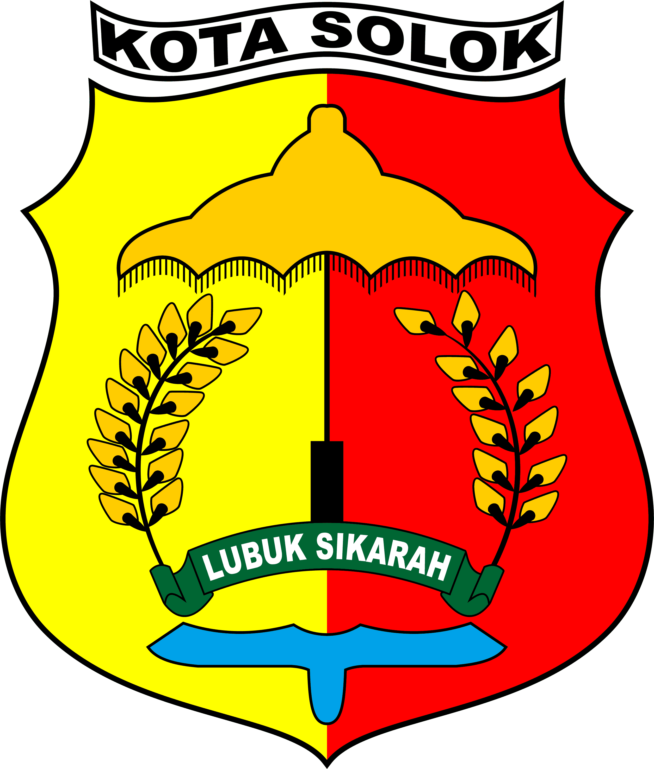 Logo Kota Solok